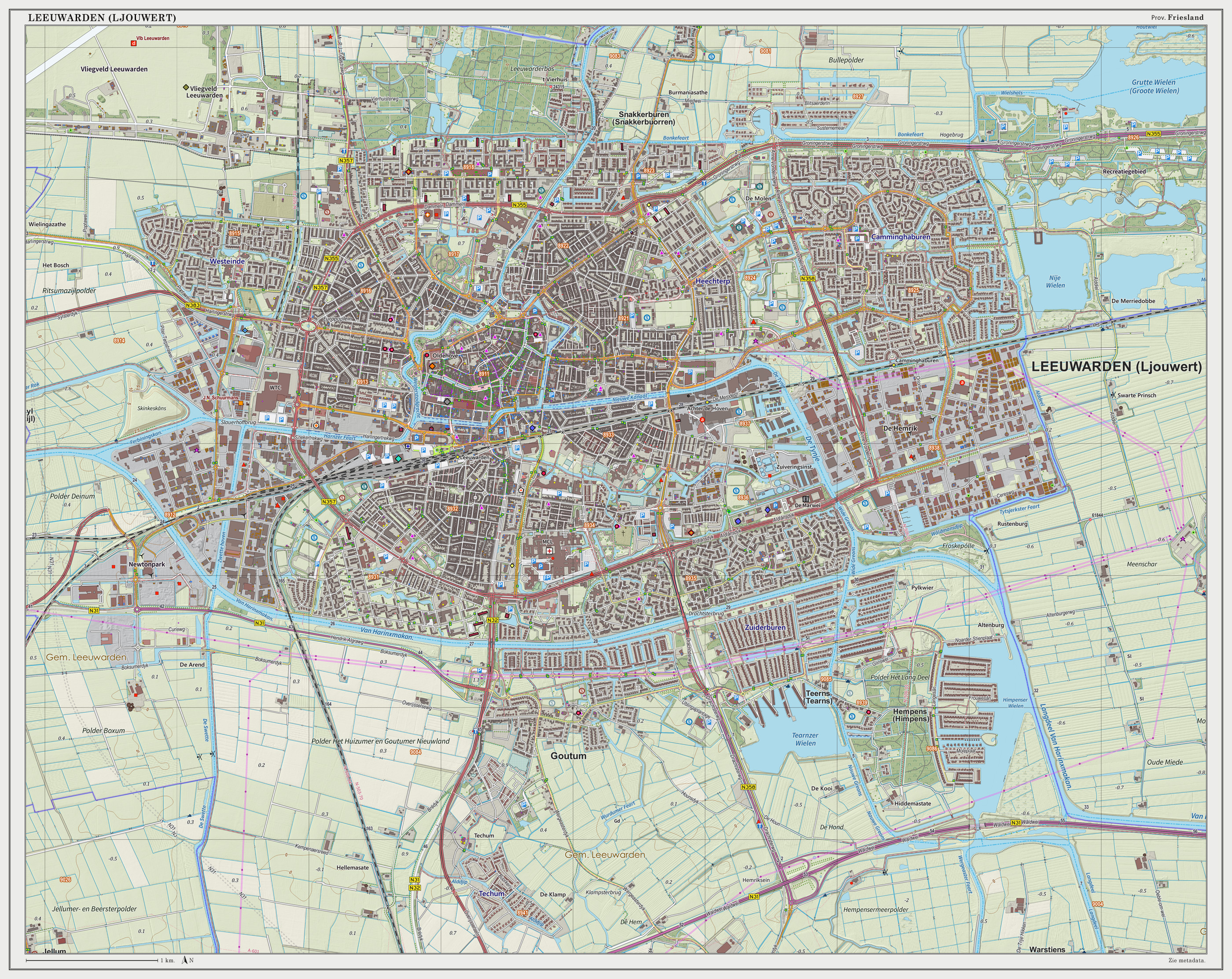 Topografische kaart van Leeuwarden (woonplaats). Resolutie: 300 pixels/km. Kaartbeeld samengesteld uit de open geodata van de Top10NL en Top25namen (Basisregistratie Topografie, Kadaster), Creative Commons BY licentie. Gebouwvlakken uit open geodata BAG extract. Wegen uit de OpenStreetMap. Reliëfschaduw uit de Actuele Hoogtekaart AHN2. Samenstelling en kleurenschema: Jan-Willem van Aalst, met QGIS2. Zie ook de Legenda.